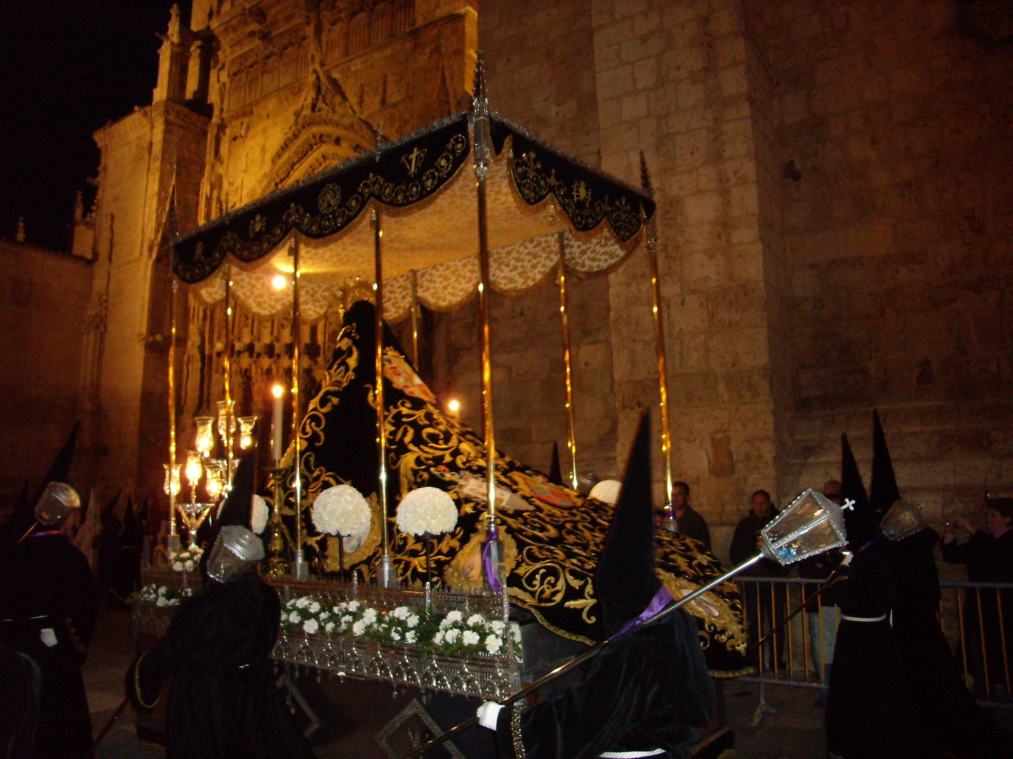 Nuestra Señora de la Soledad. Semana Santa de Palencia.